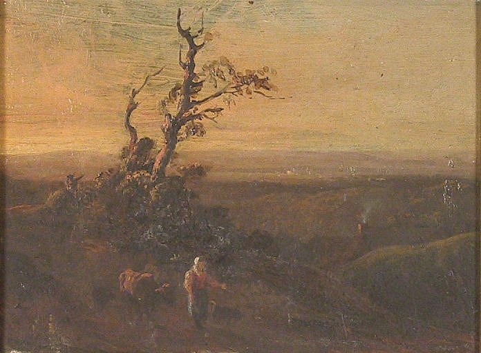 Geanimeerd landschap: herder met zijn kudde. Olie op hout 17 x 21,8 cm Museum Loire-Atlantique